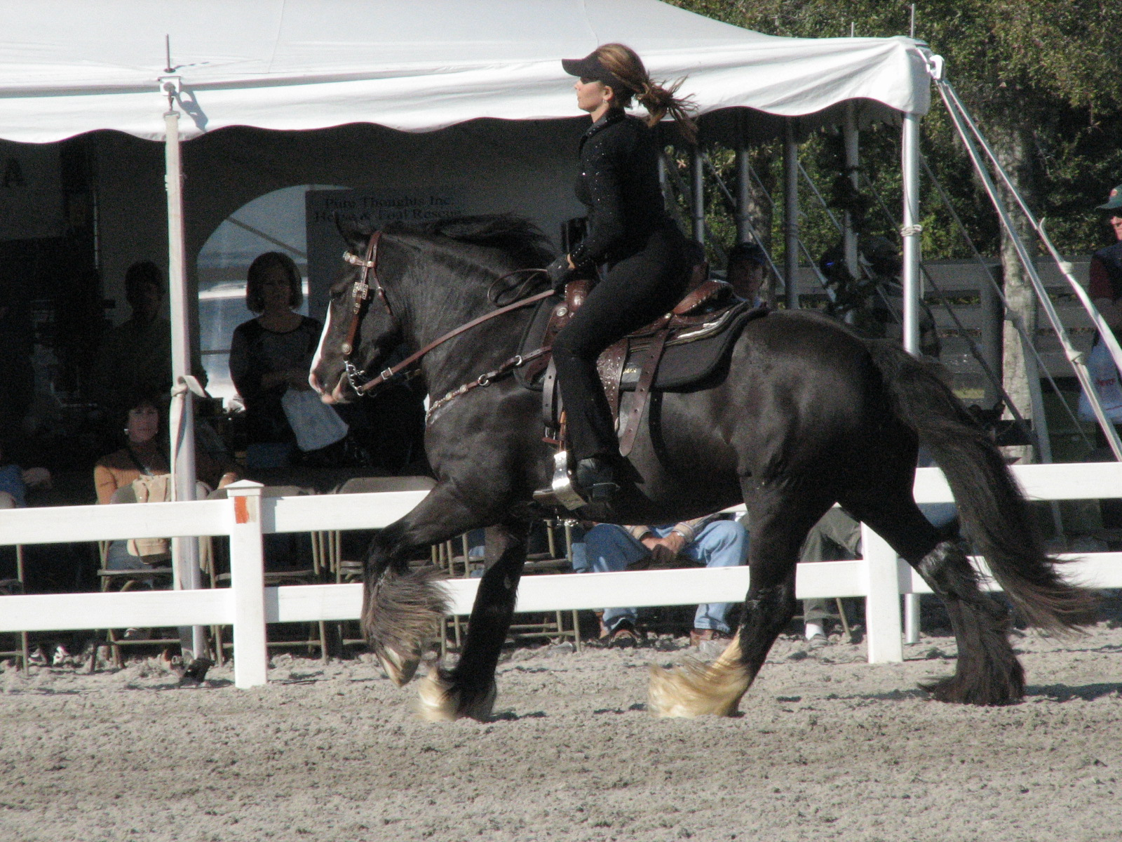 equine horse expo